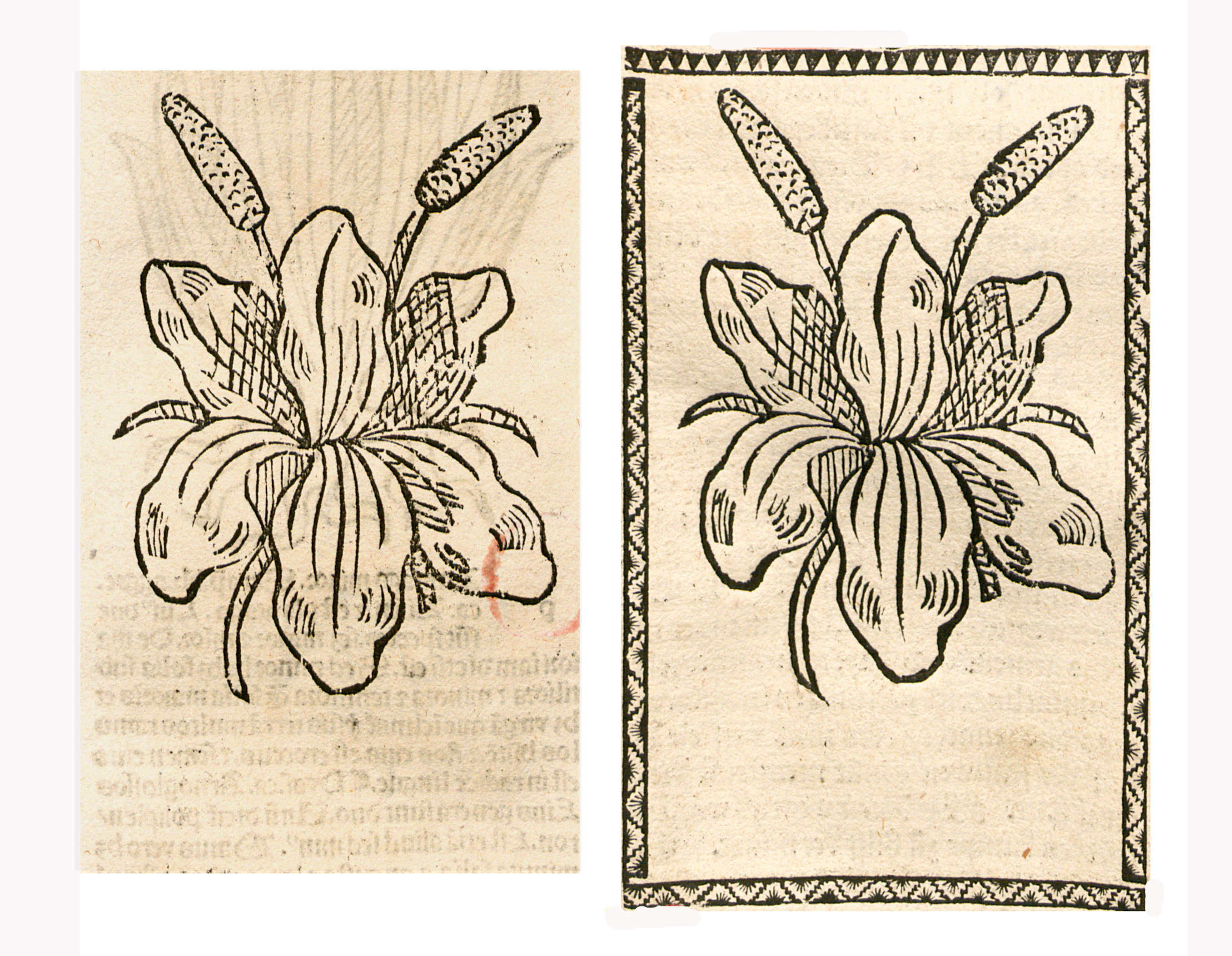 Abbildung von: Grossem Wegerich